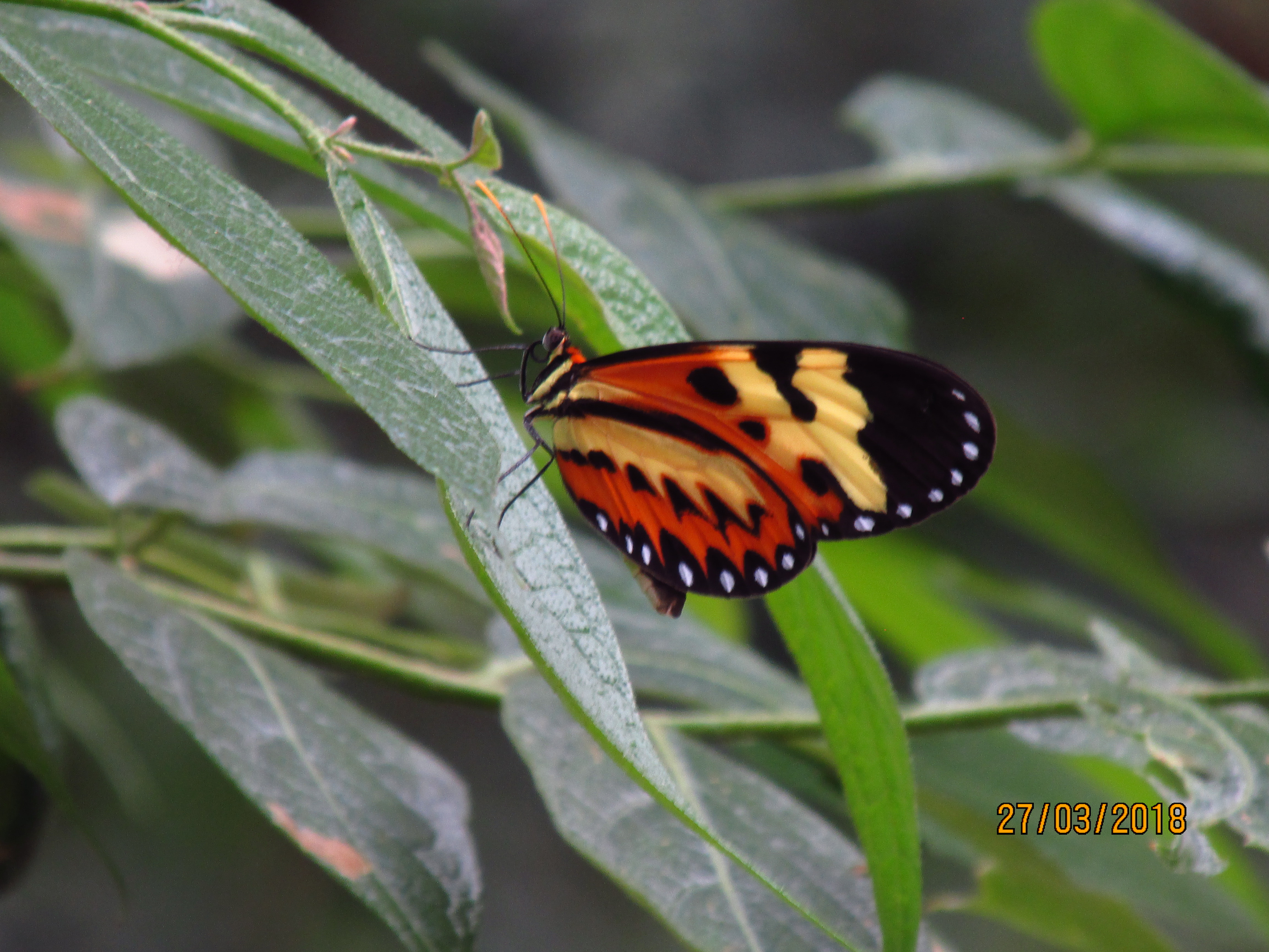 Foto de borboleta Mechanitis Polymnia sobre solanácea para postura de ovos, registrada em 27/03/2018, em monitoramento feito na Cidade Universitária - USP - SP. Foto por: Juliana Lira. Picture of Mechanitis Polymnia butterfly upon a solanaceae plant, taked on March, 27th, 2018, in a monitoring at Cidade Universitária - USP - SP. Picture taked by: Juliana Lira.